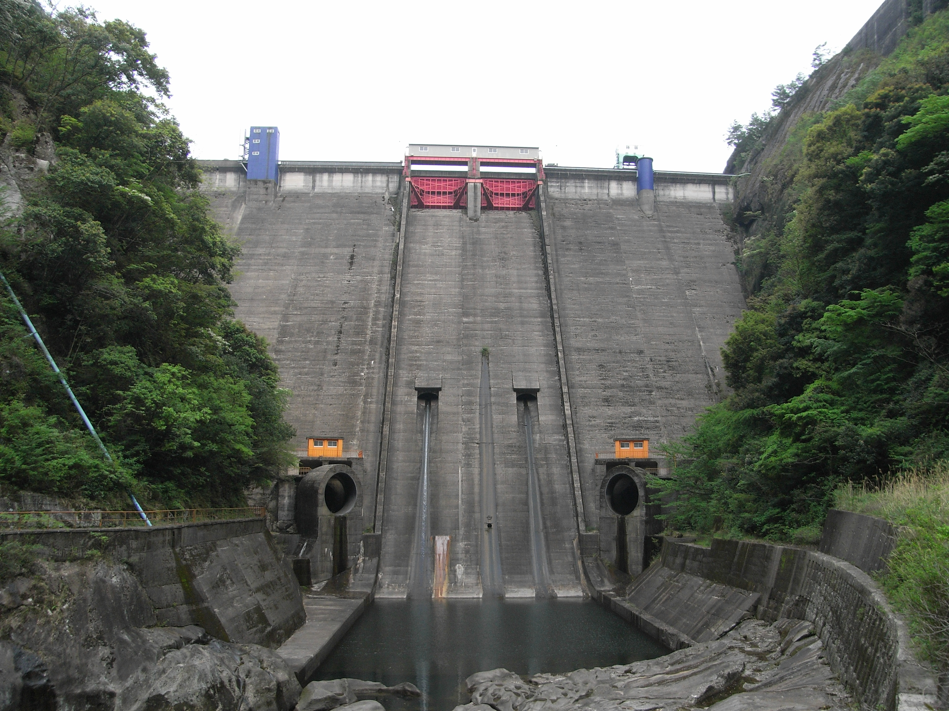 Dam